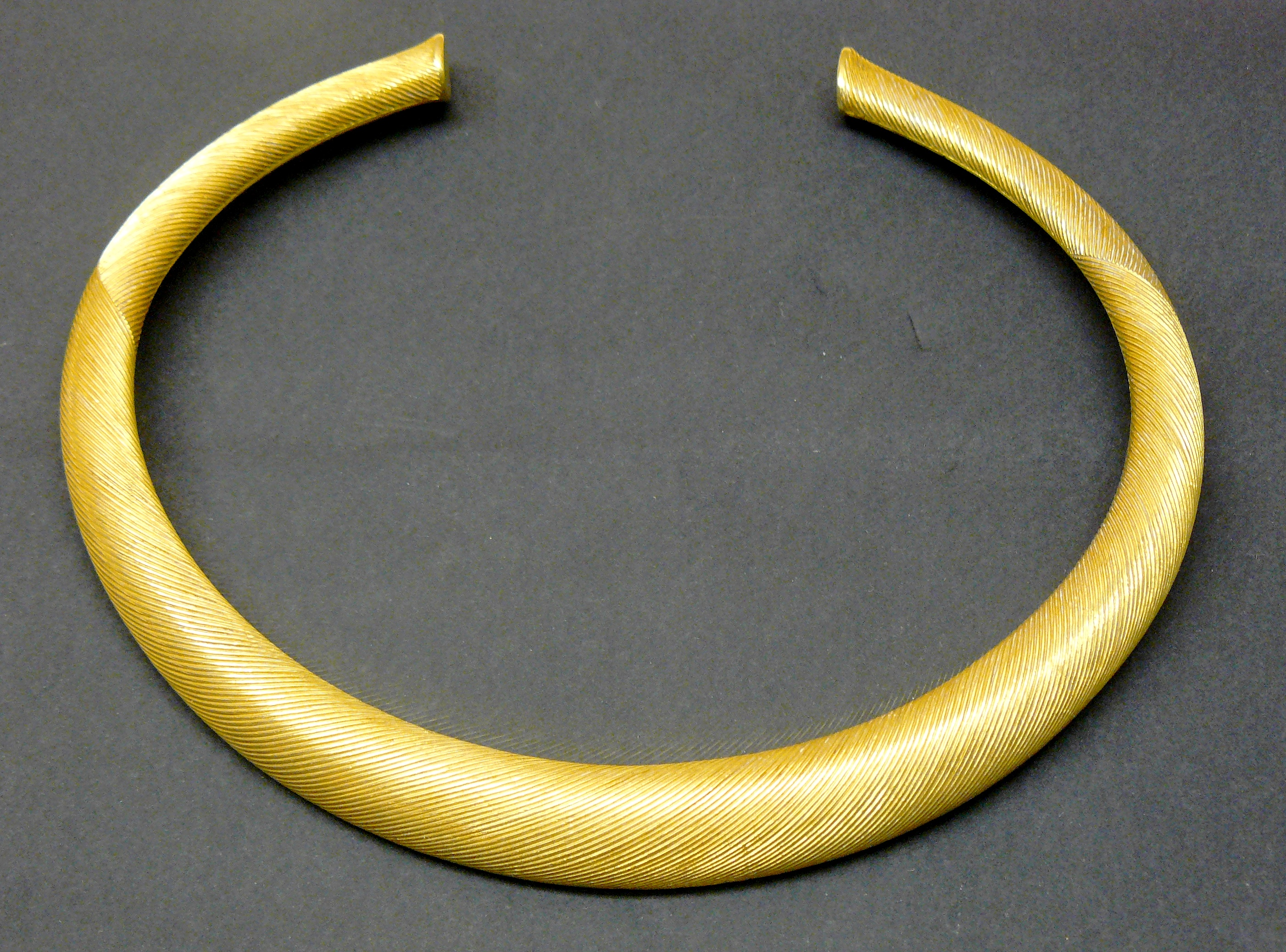 Torque en or finement strié découvert fortuitement en 1985, avec 4 autres exemplaires plus petits, à Guînes (Pas-de-Calais) dans le marais au lieu dit "Le Pont à Vaches". Poids 794 grammes , environ 16 cm de diamètre, vers 1200/1000 av. J.C. - Musée d'archéologie nationale, Saint-Germain-en-Laye - Inv. n° 89 505